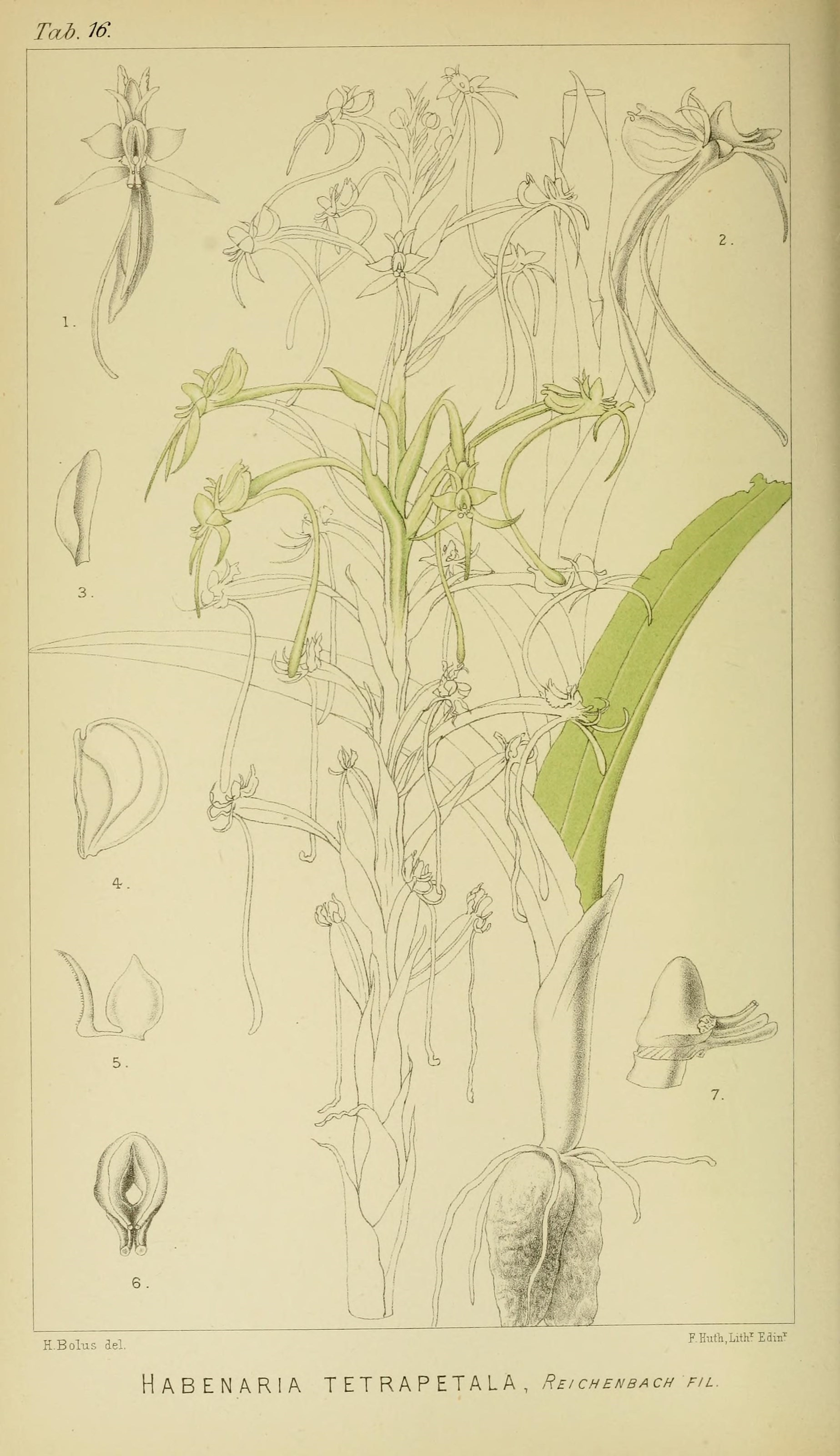 Tcub.lff. \ H.Bolus del. r.Hufh.Lith' Edin'^ HABENARIA TETRAPETALA, Reichenbach fil.